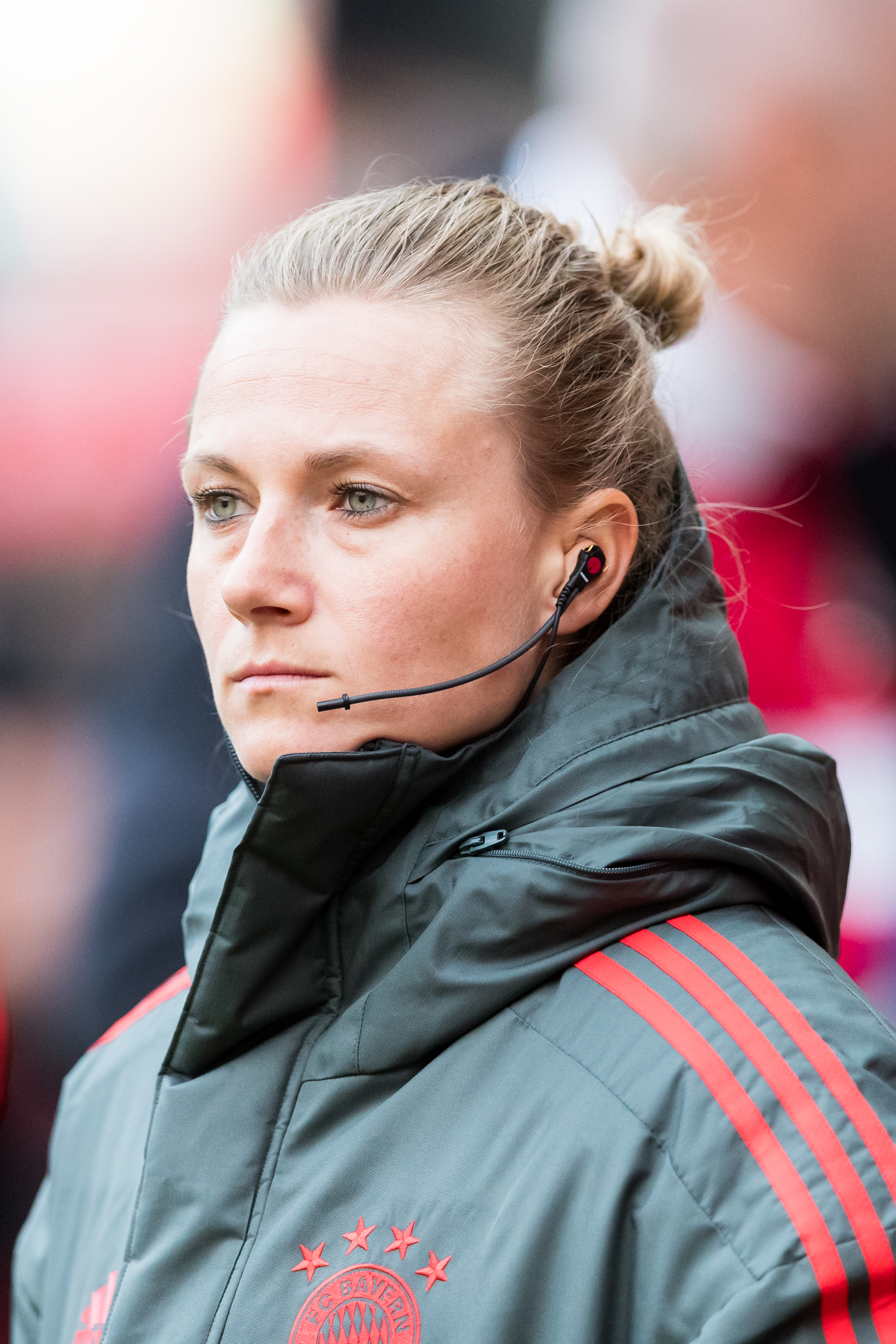 during 1.FC Kaiserslautern vs FC Bayern München at Fritz-Walter-Stadion, Kaiserslautern, Rheinland-Pfalz, Germany on 2019-05-27, Photo: Sven Mandel